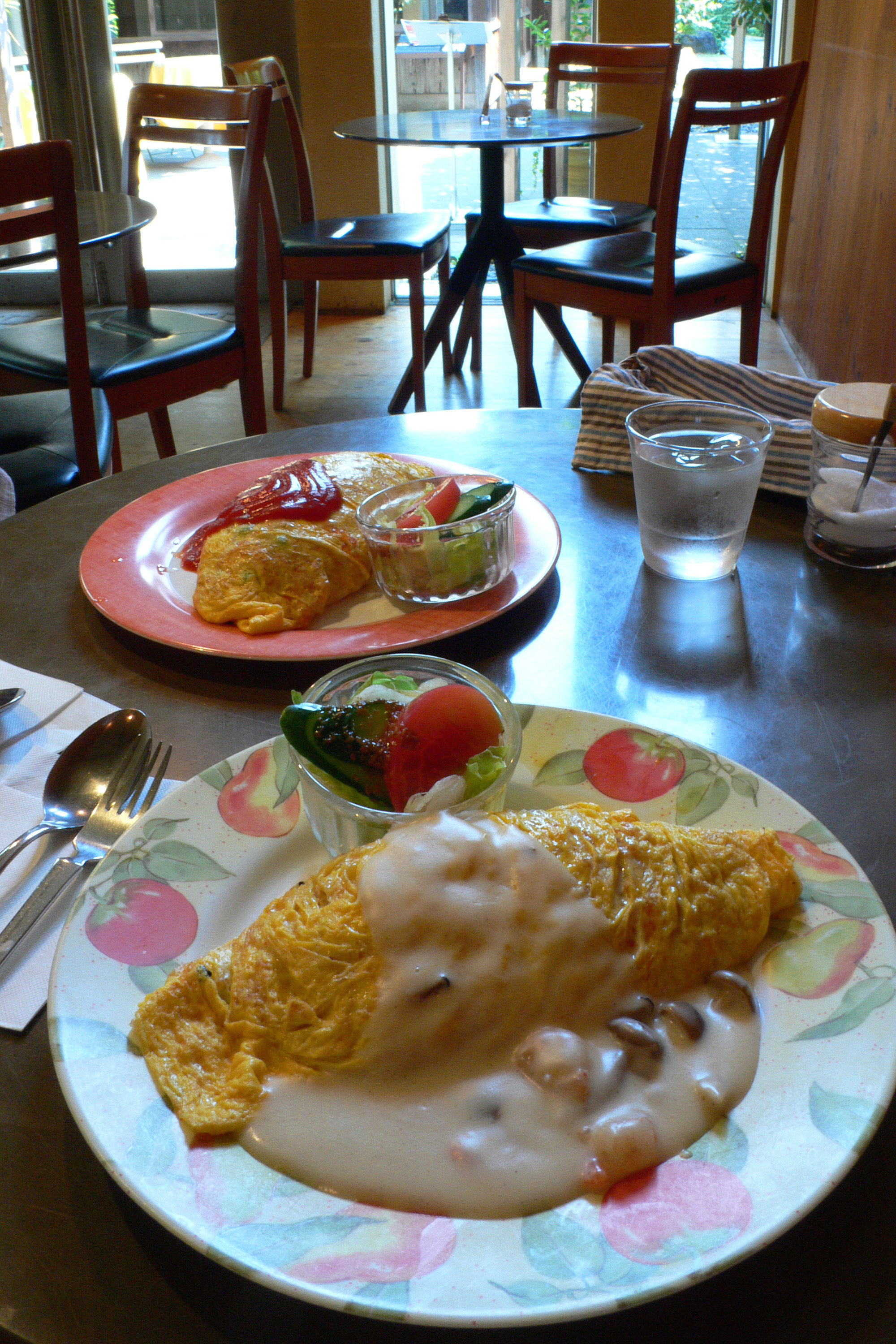 Kurokabe Museum of Kurokabe Square in Nagahama, Shiga, Japan